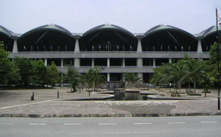 Fachada de la Terminal Principal. Kuala Lumpur International Airport Departure and Arrival building. The top concourse if Departure Level 5, the middle concourse is Arrival Level 4 and 3, and the bottom concourse is train and bus Level 2 and 1. Photo details: Make - Minolta Co., Ltd. Model - DiMAGE Xt DateTime - 2004:08:20 13:13:30 ExposureTime - 10/1800 seconds FNumber - 6.7000 ISOSpeedRatings - 50 FocalLength - 6.0000 mm